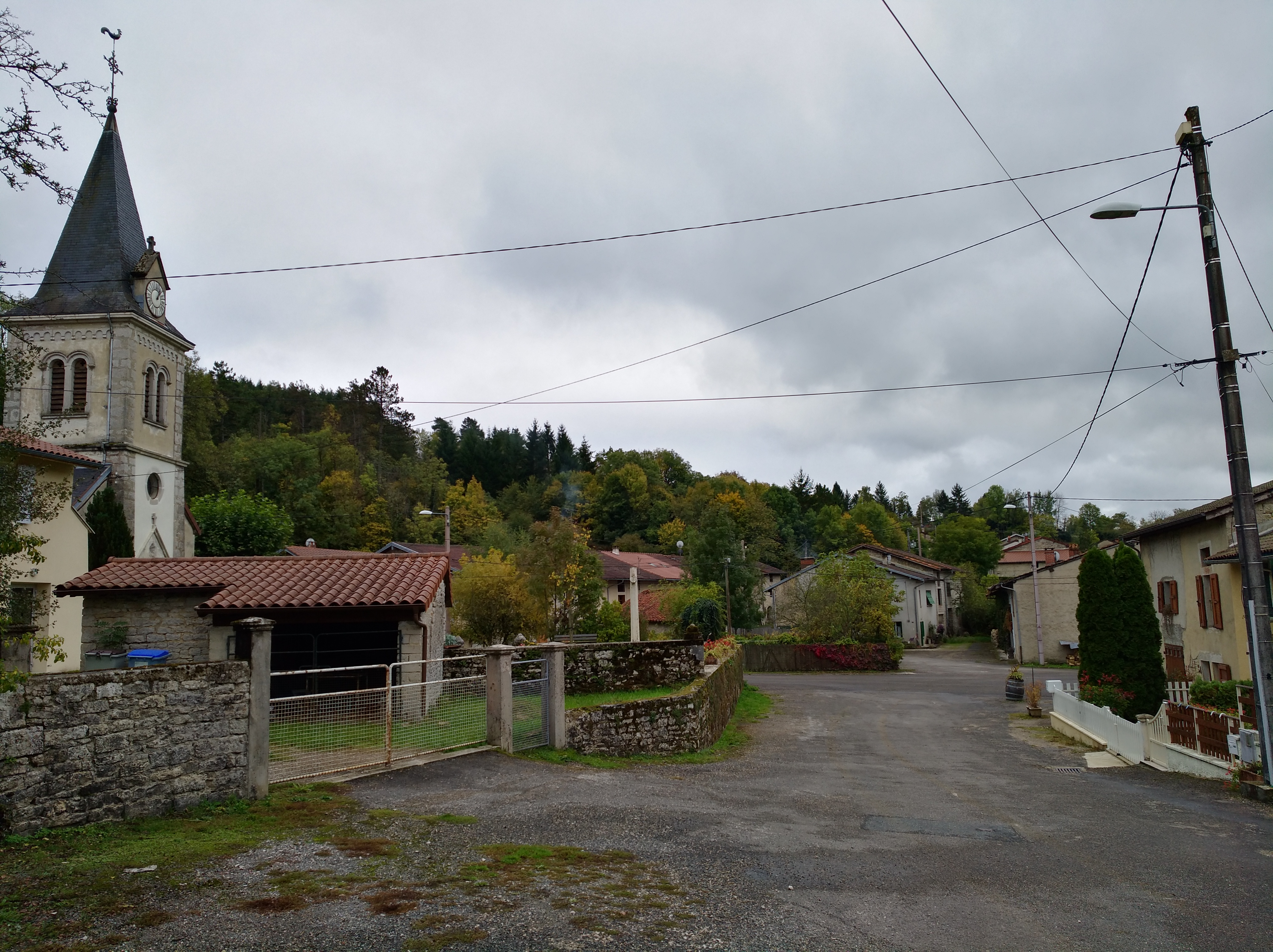 Villechantria (Val Suran, Jura, France).